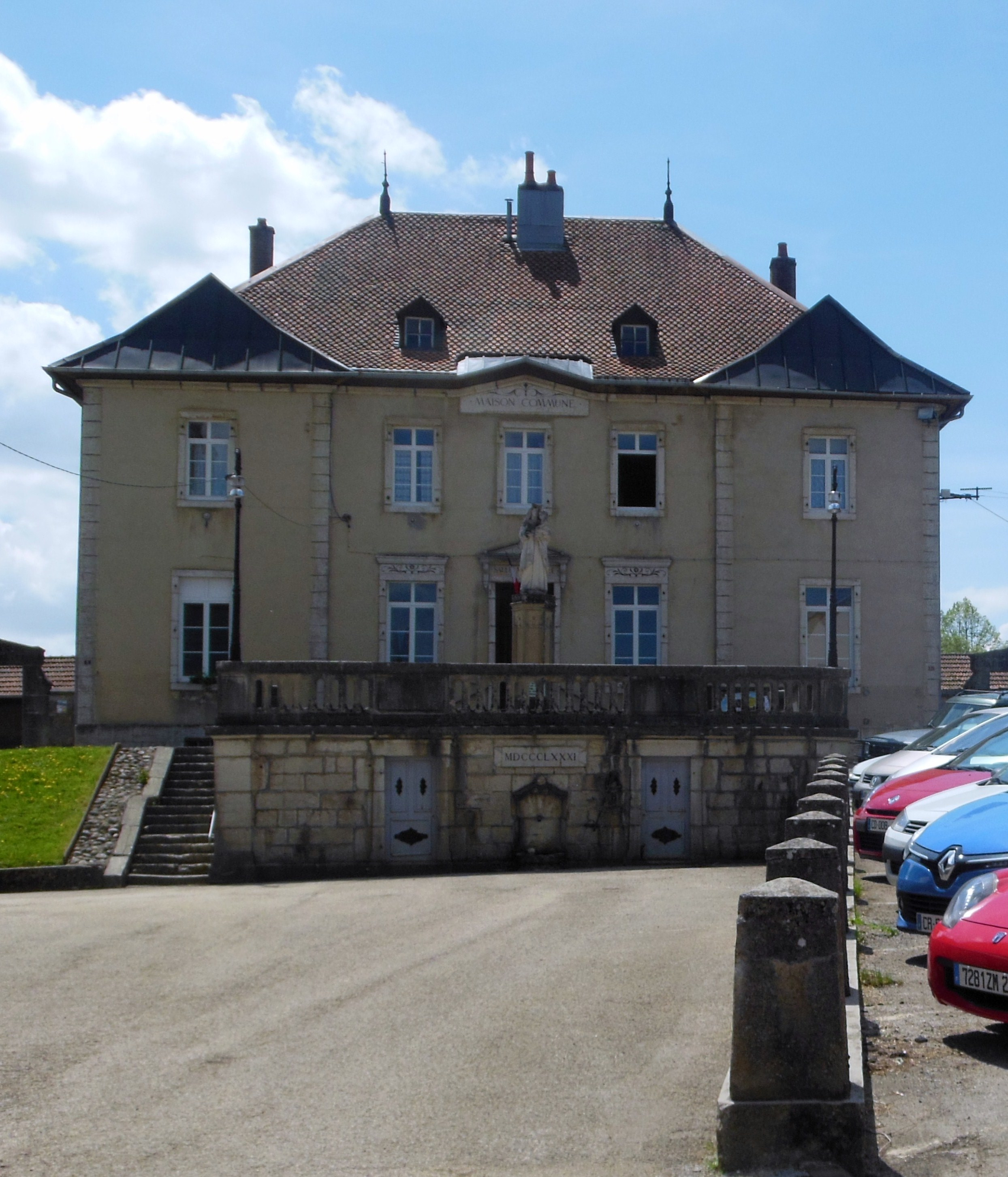 Mairie-école (XIXe s), Place François-Xavier Joubert, à Fournet-Blancheroche.